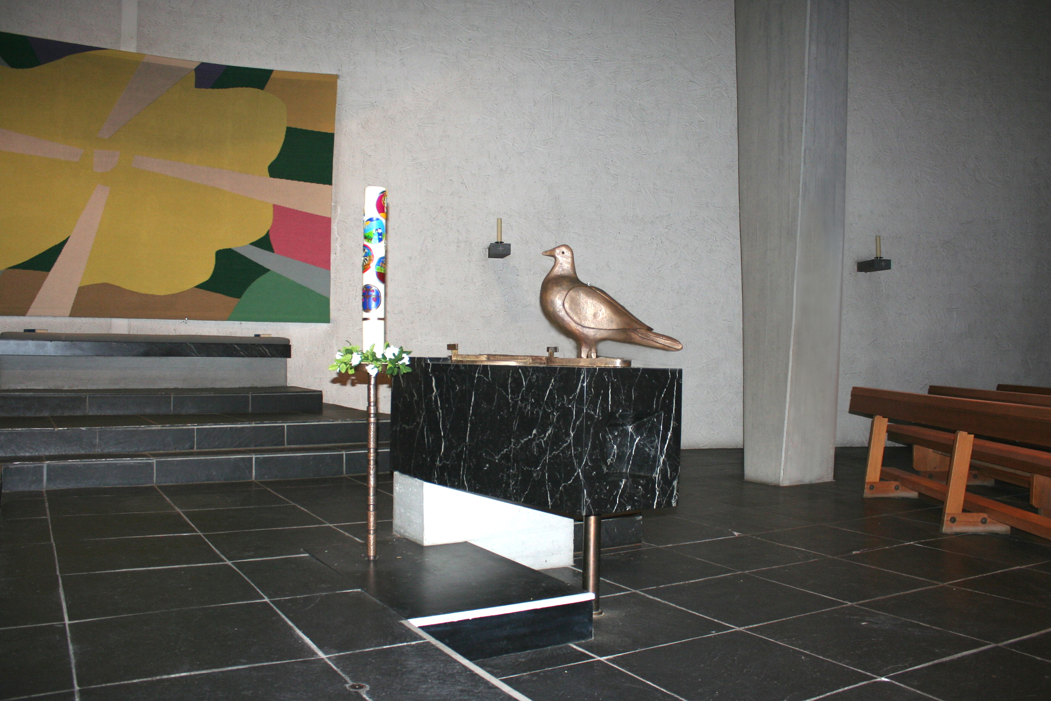 Römisch-katholische Pfarrkirche St. Mauritius Oberengstringen, Taufstein